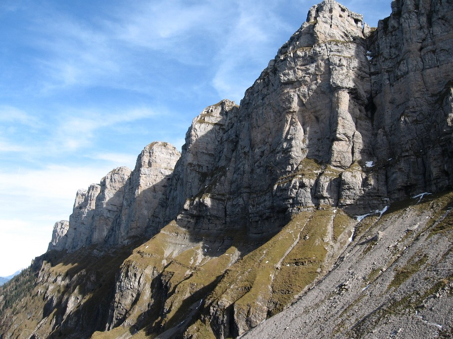 Sieben Hengste von Westen, von der Sichle